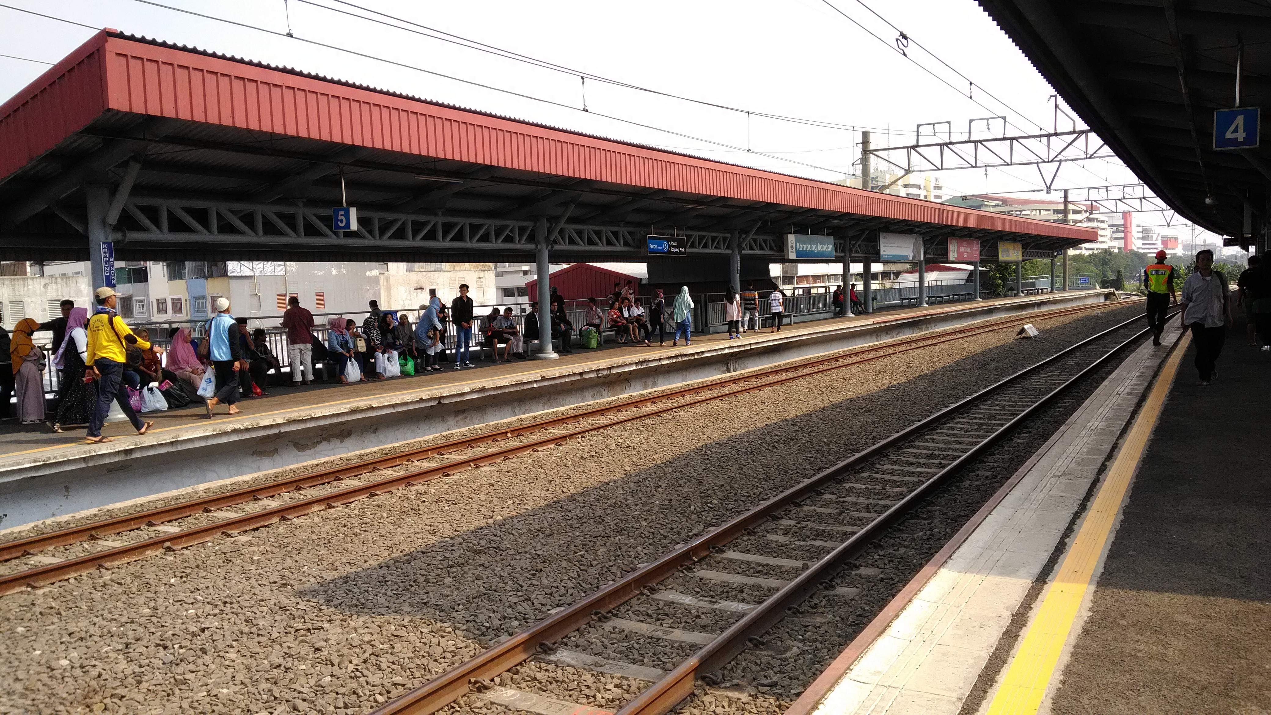 Sunda: Stasion Kampung Bandan Bagian Luhur 1